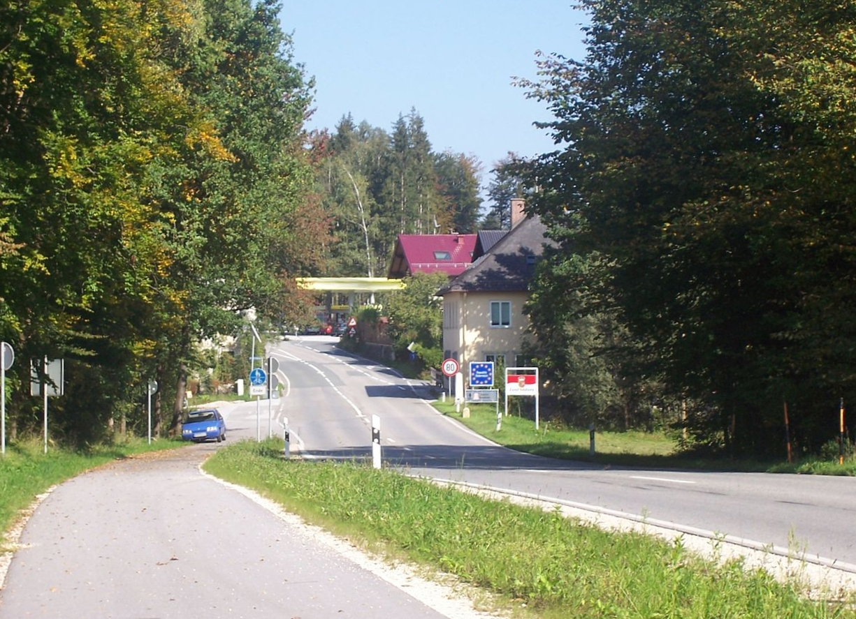 B 21 bei der Grenze zu Österreich Bei Verwendung bitte ich hier um einen Hinweis, wo das Foto genutzt wird.